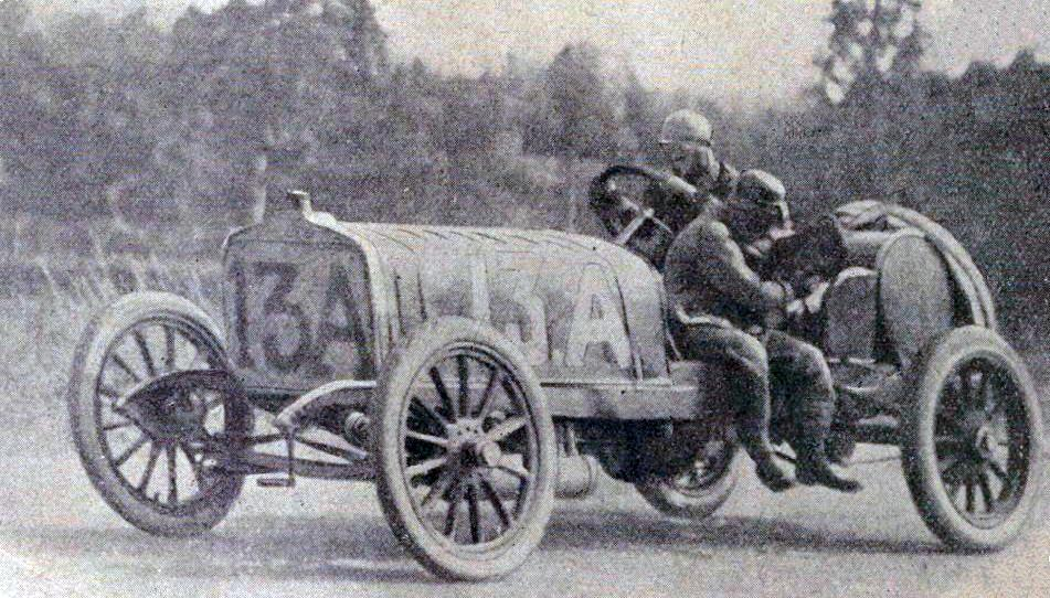 Albert Clément au Grand Prix de l'ACF 1906, en pleine vitesse à Saint-Mars-la-Brière